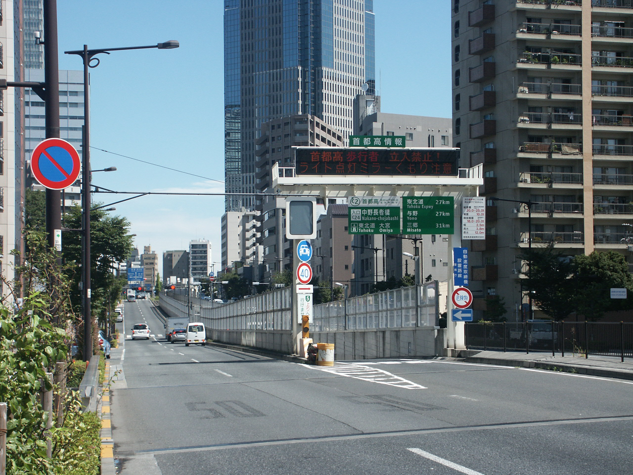 首都高速道路中央環状線中野長者橋入口付近（板橋ＪＣＴ方面側入口）